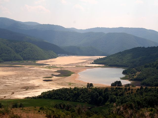 Tailing im Kreis Pirdop